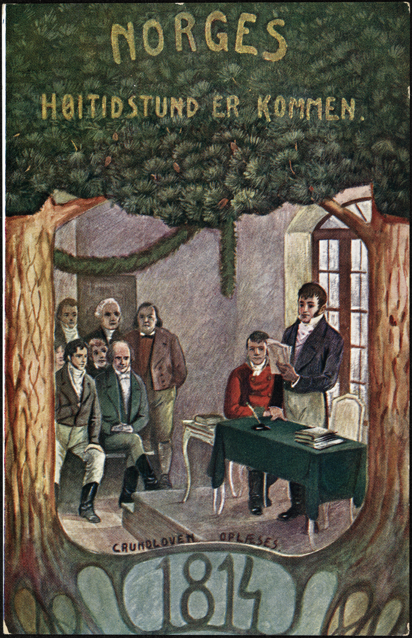 Tittel / Title: Norges Høitidstund er kommen : Grundloven oplæses Beskrivelse / Description: Postkort. Dato / Date: 1914 Kunstner / Artist: ukjent / unknown Utgiver / Publisher: ukjent / unknown Eier / Owner Institution: Nasjonalbiblioteket / National Library of Norway Lenke / Link: Bildesignatur / Image Number: blds_05716